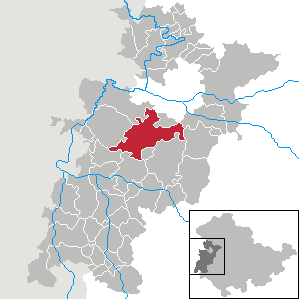 Marksuhl in Thuringia - Wartburgkreis